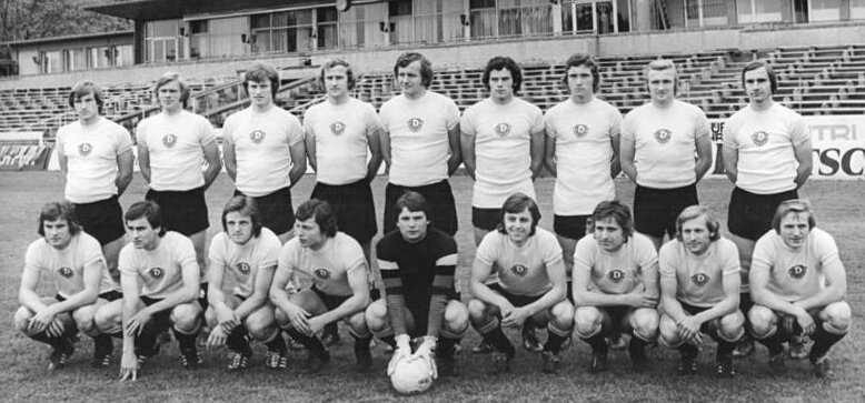 ADN-ZB-Häßler-15.5.76-Dresden: SG Dynamo Dresden DDR-Fußballmeister 1976. Sie erkämpften den Meistertitel: (stehend von links) Hans-Jürgen Dörner, Klaus Lichtenberger, Udo Schmuck, Hans-Jürgen Kreische, Franz Ganzera, Hartmut Schade, Gerd Weber, Siegmar Wätzlich, Klaus Müller, (vorn von links) Christian Heim, Reinhard Häfner, Peter Kotte, Frank Richter, Torwart Klaus Boden, Rainer Sachse, Matthias Müller, Gert Heidler und Dieter Riedel.